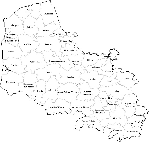 Cantons du Pas-de-Calais en 1868